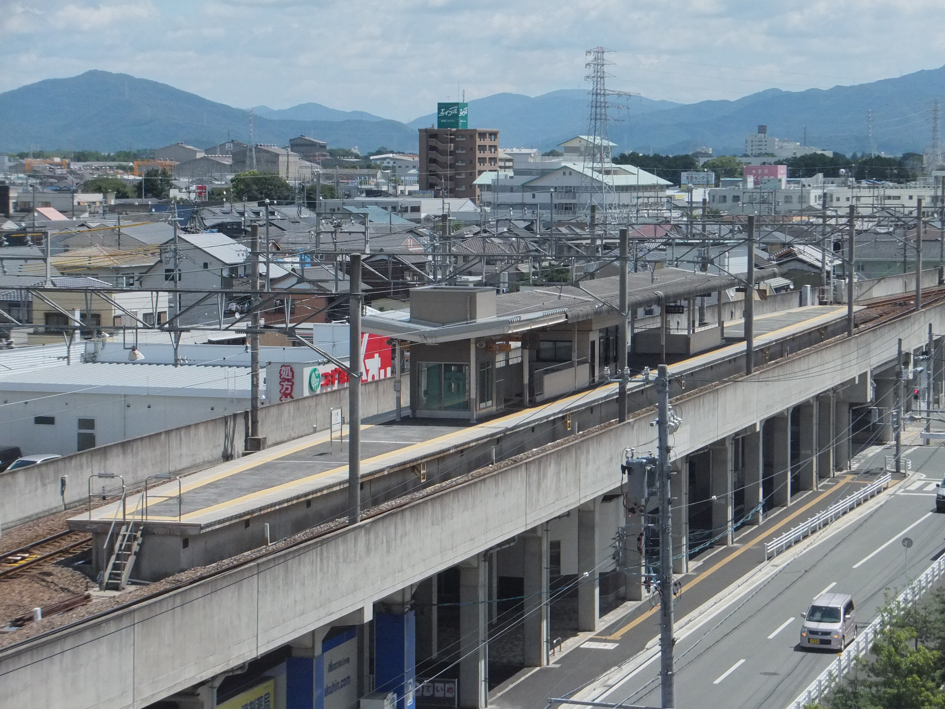 八幡駅。愛知県豊川市八幡町鐘鋳場